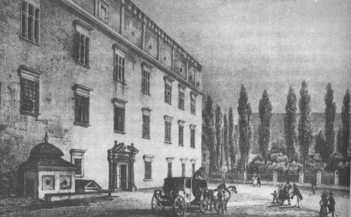 J. N. Głowacki "Pałac Wielopolskich" 1836. Dawny pałac Jana Tarnowskiego, od XVII wieku należący do Wielopolskich. Widok na główną fasadę od zachodu - obecnie fasada tylna